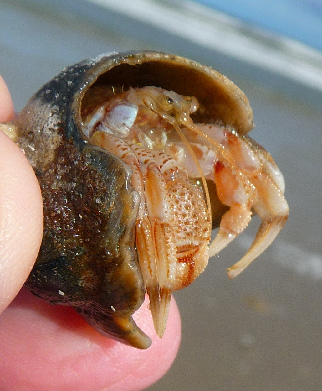 Einsiedlerkrebs (Pagurus bernhardus) in den Resten des Gehäuses einer Wellhornschnecke (Buccinum undatum), fotografiert auf der ostfriesischen Nordseeinsel Juist (Niedersachsen, Deutschland)